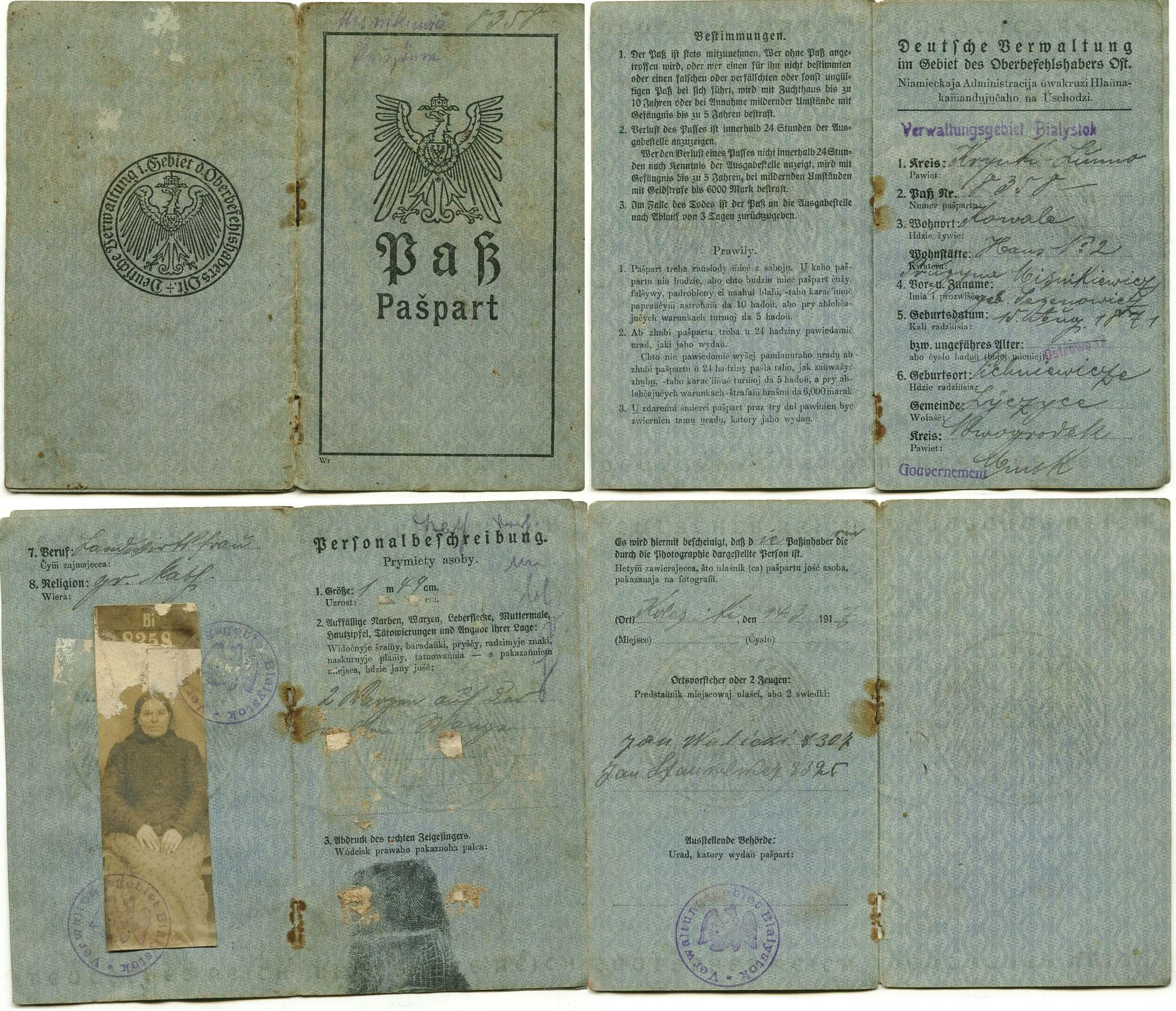 Беларуская (тарашкевіца): пашпарт на беларускай лацінцы Нямецкай адміністрацыяй ў акрузе Галоўнакамандуючага на Ўсходзе, выдадзены 17 сакавіка 1917 (Беласток)